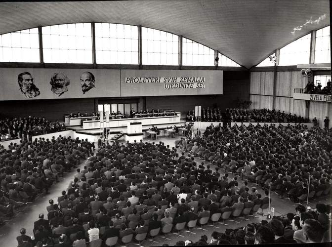 Srpski (latinica): Sedmi kongres SKJ u Ljubljani 1958. godine